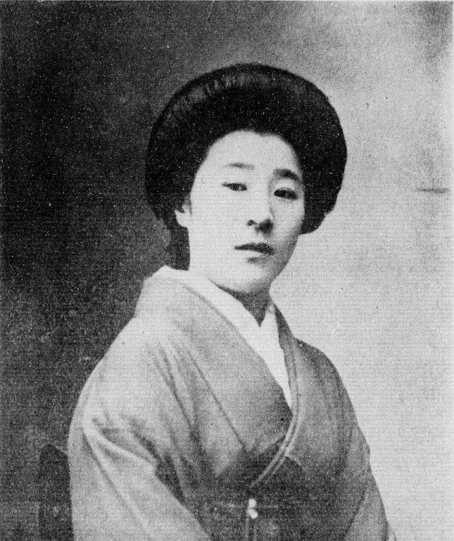 中村歌扇 1919